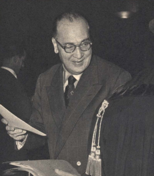 Italian journalist Antonino Trizzino